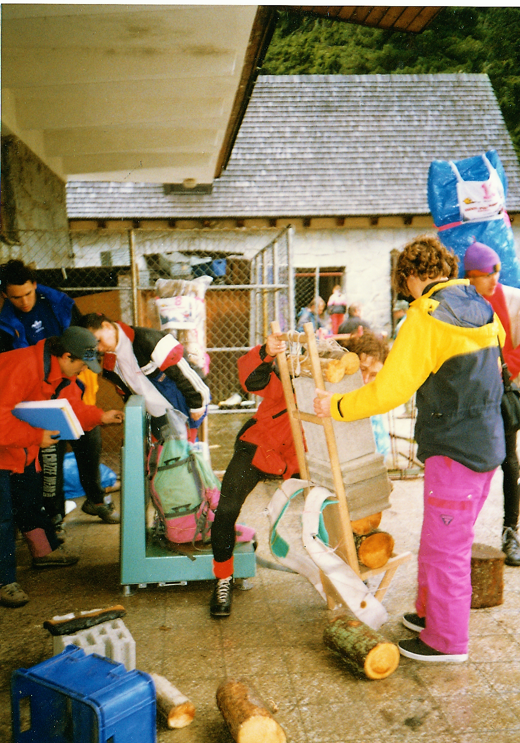 Pred pretekmi horských nosičov Sherpa rallye na Popradskom plese v októbri 1966